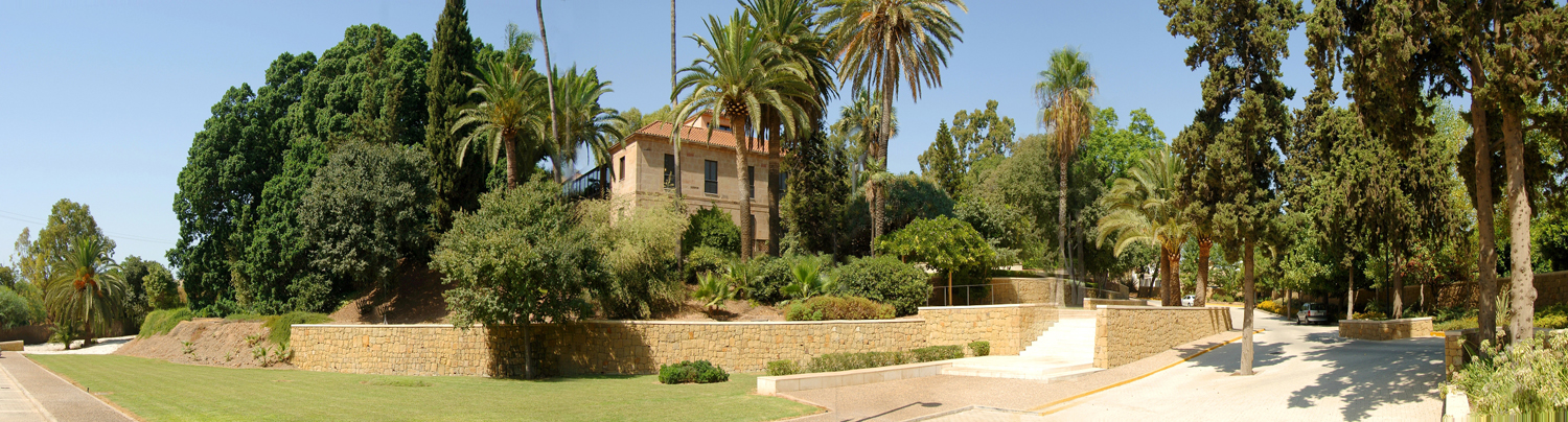 Sede de la Fundacion san Telmo en Málaga